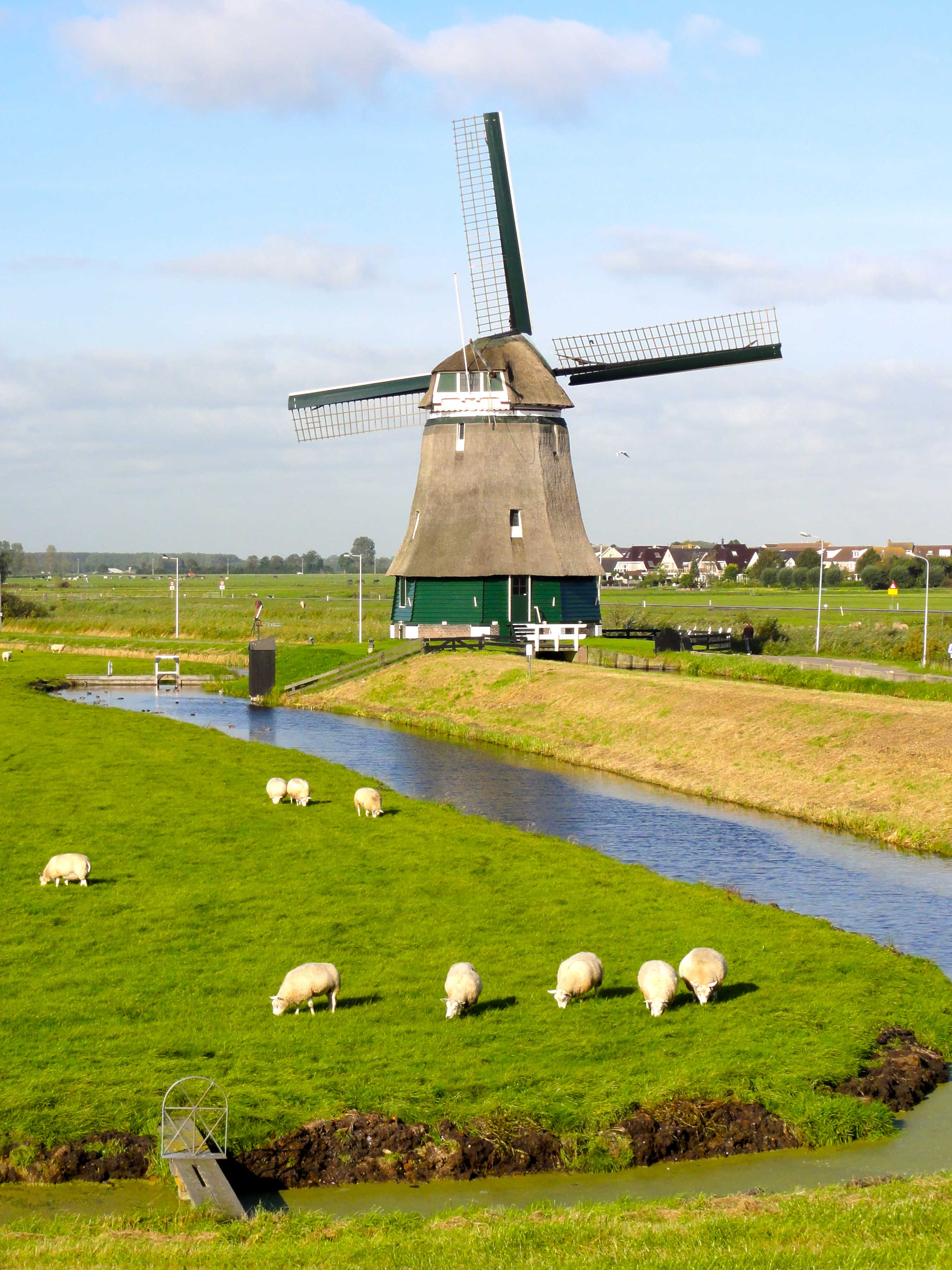 Molen de Kathammer nabij Volendam